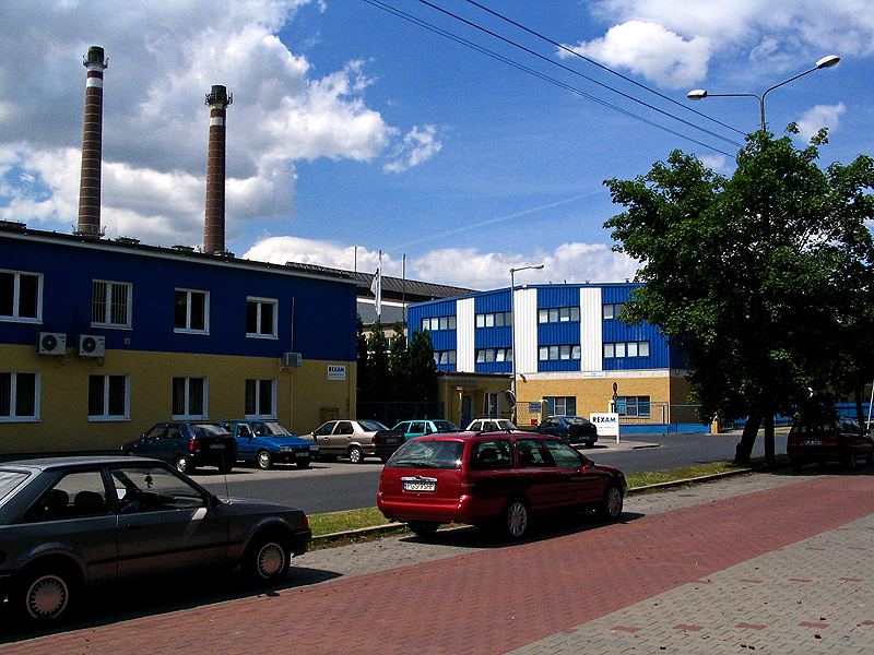 Huta Szkła "REXAM" w Gostyniu.